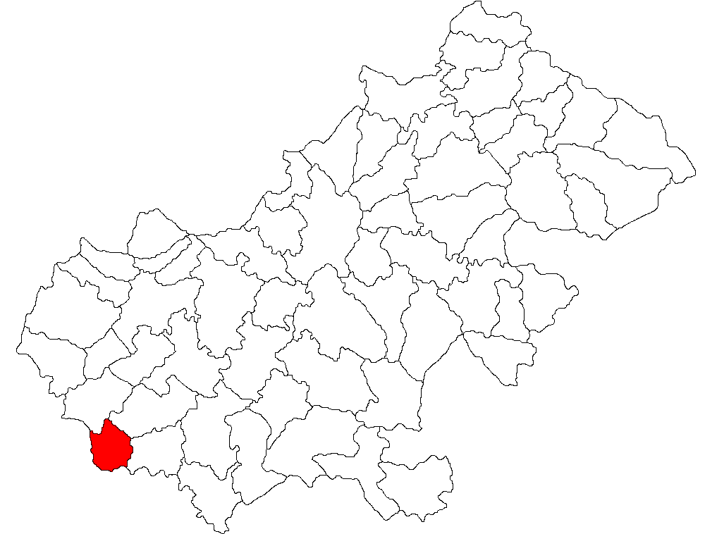 Categorie:Hărţi ale judeţului Satu Mare